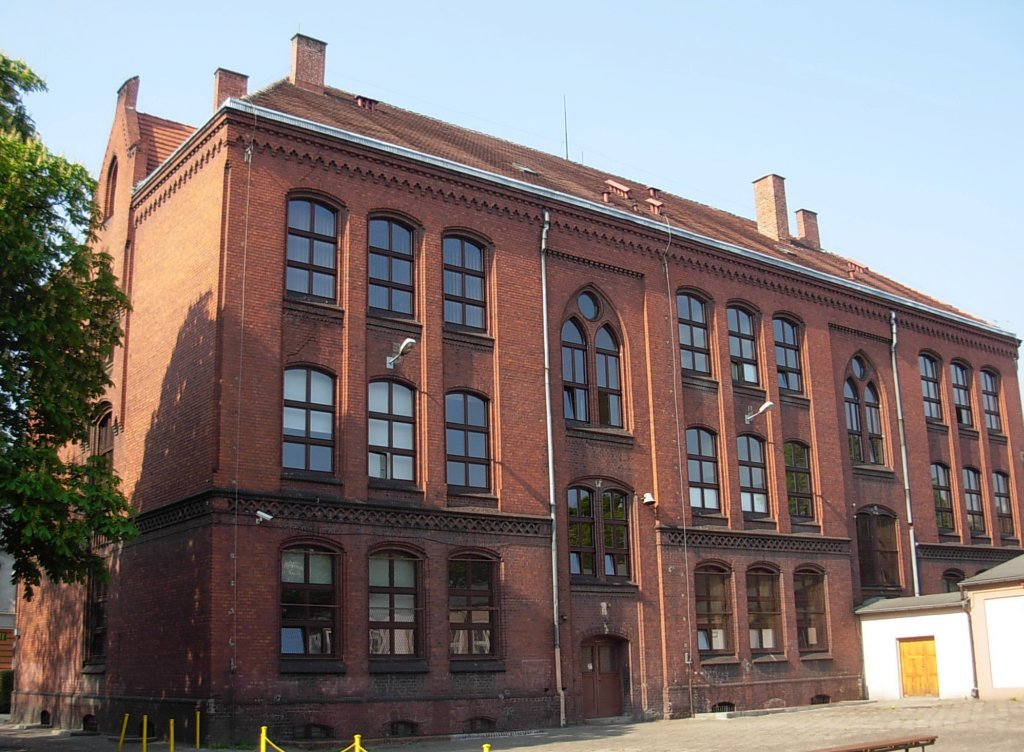 Budynek CM UMK w Bydgoszczy, dawniej Johannisschule, ul. Świętojańska 20 (1887-1888, Carl Meyer)